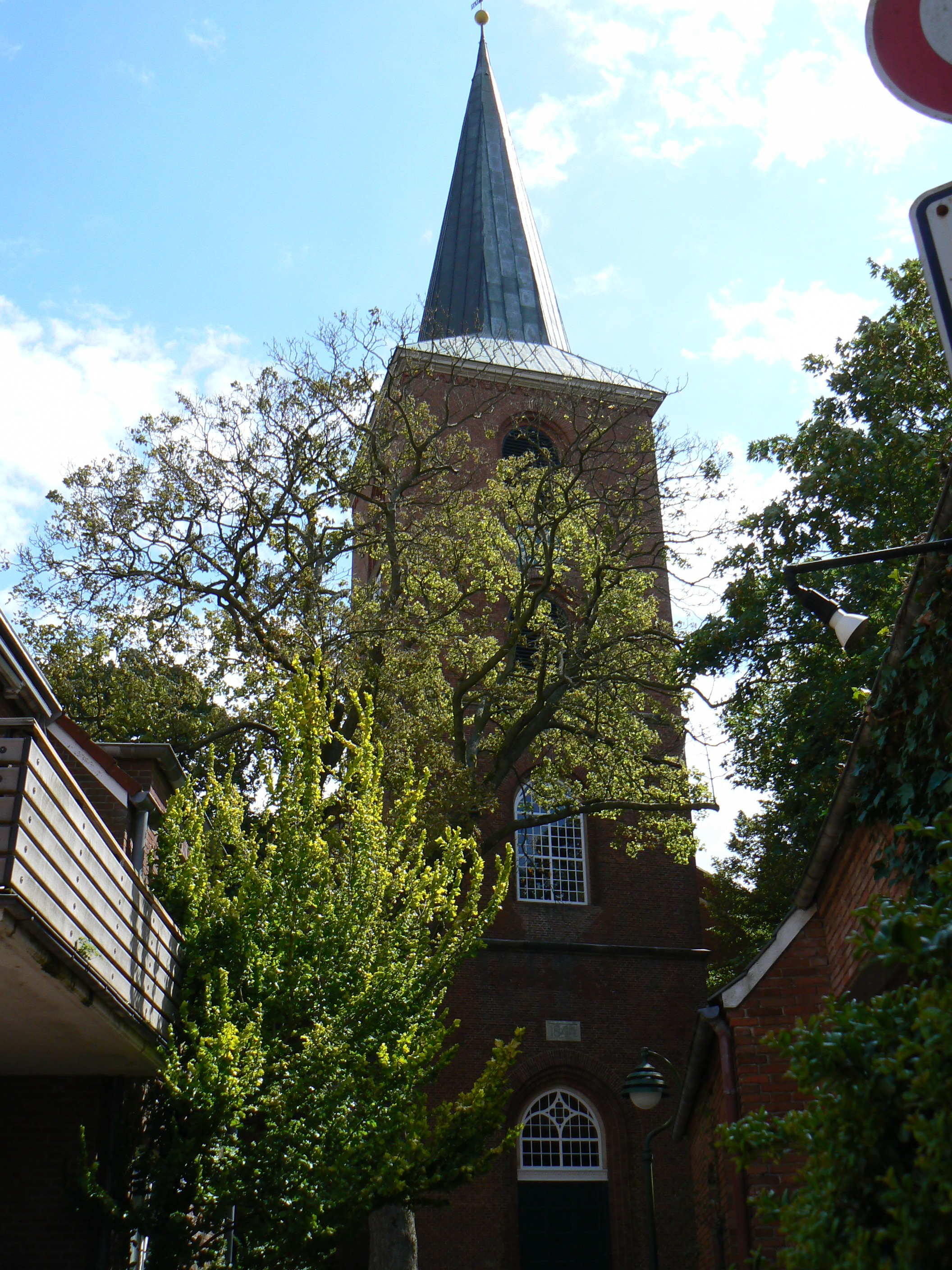 St.-Magnus-Kirche in Esens/Germany (1848)